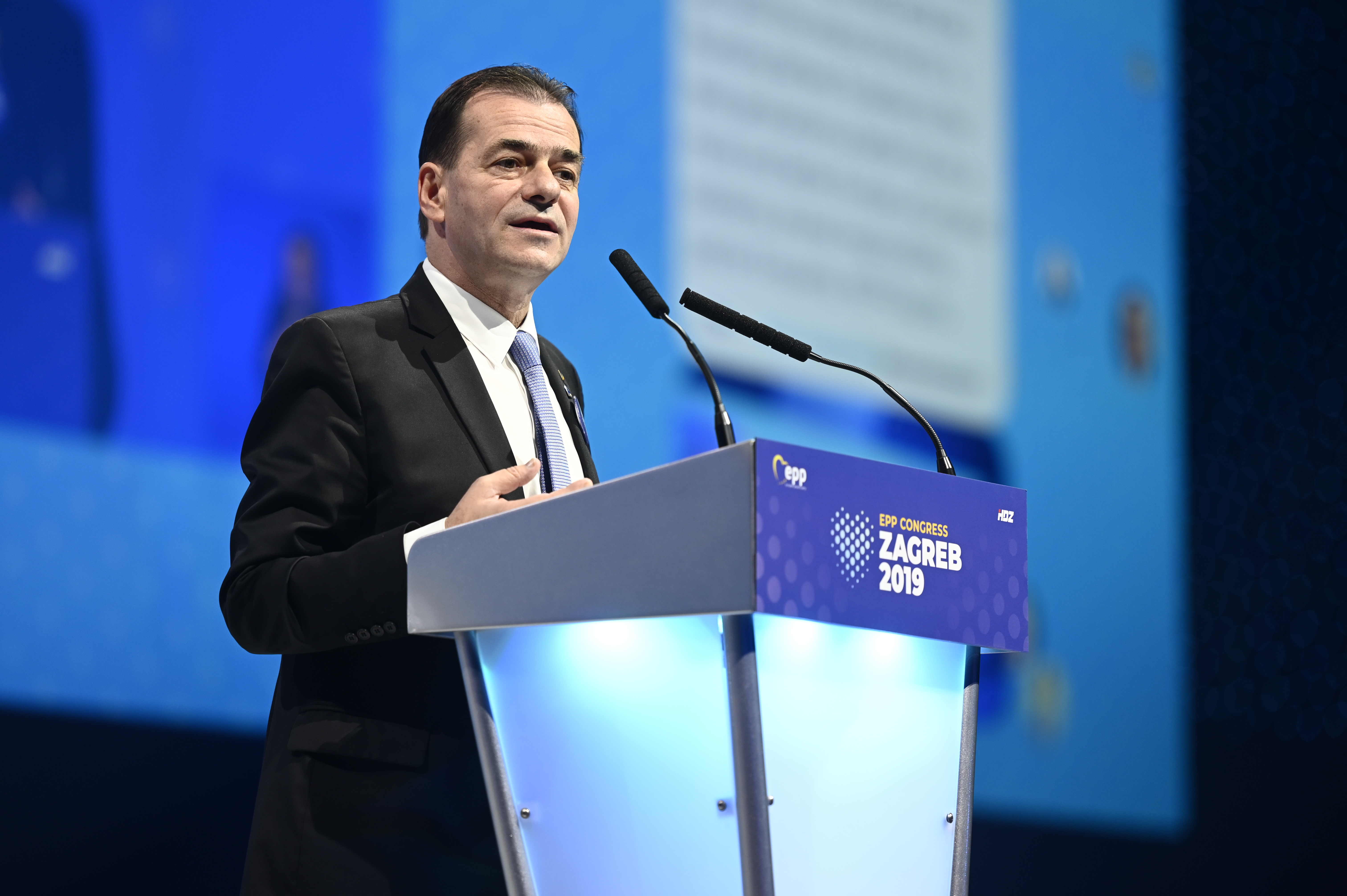 20-21 November 2019